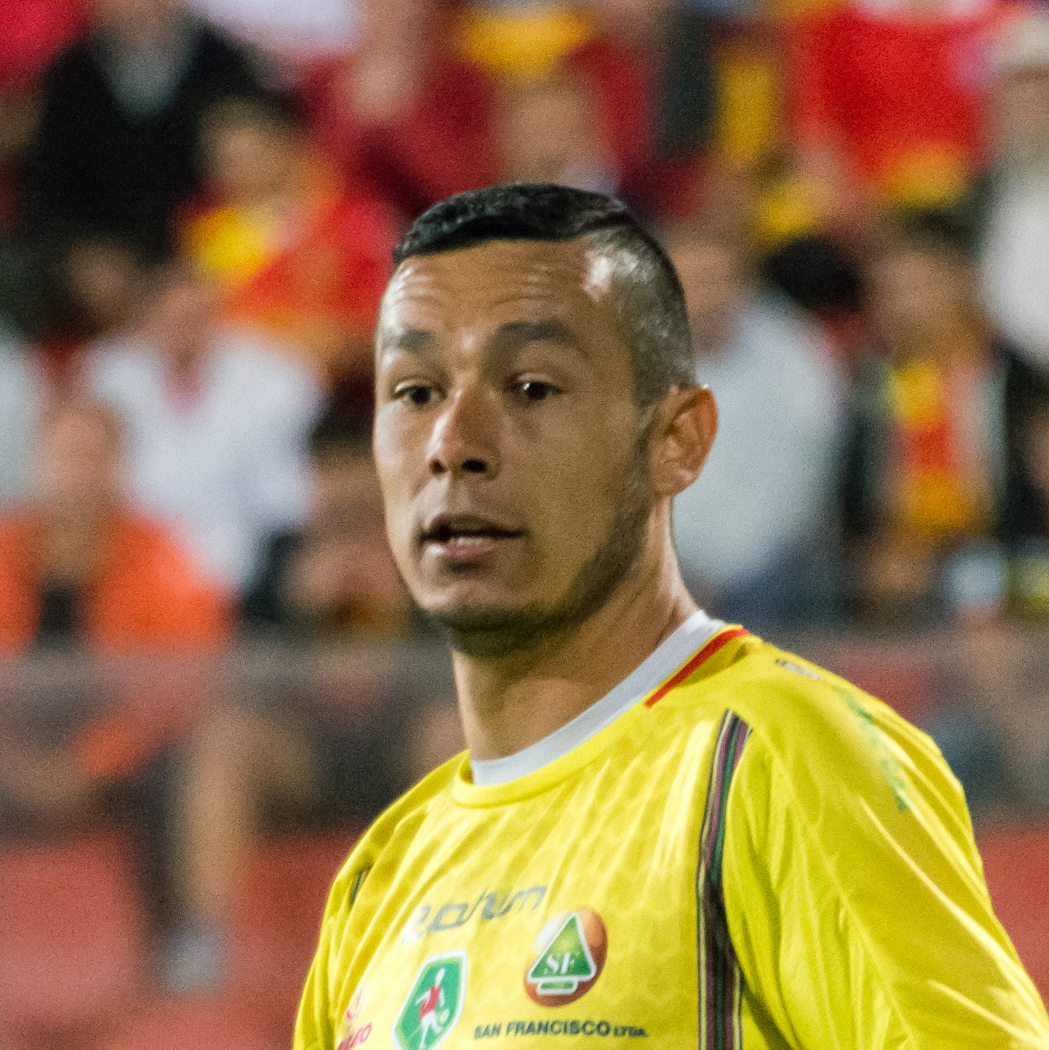 Bernardo Medina, Unión Española v Mushuc Runa, Estadio Santa Laura, Independencia, Santiago, Región Metropolitana, Chile.